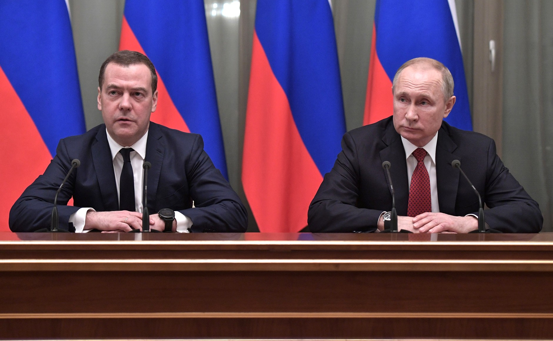 Владимир Путин и Дмитрий Медведев 15 января 2020 года